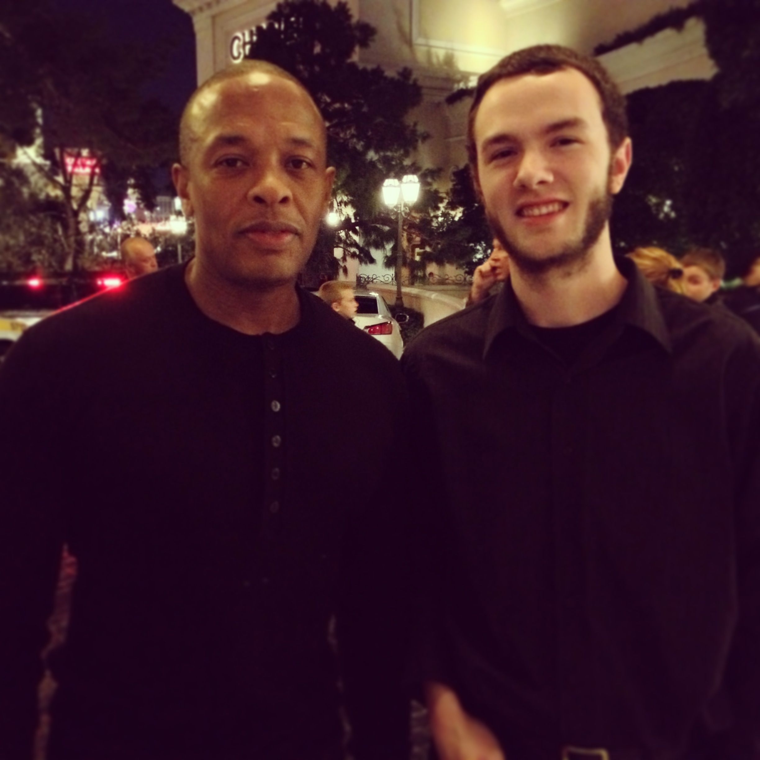 Dr.Dre in Vegas